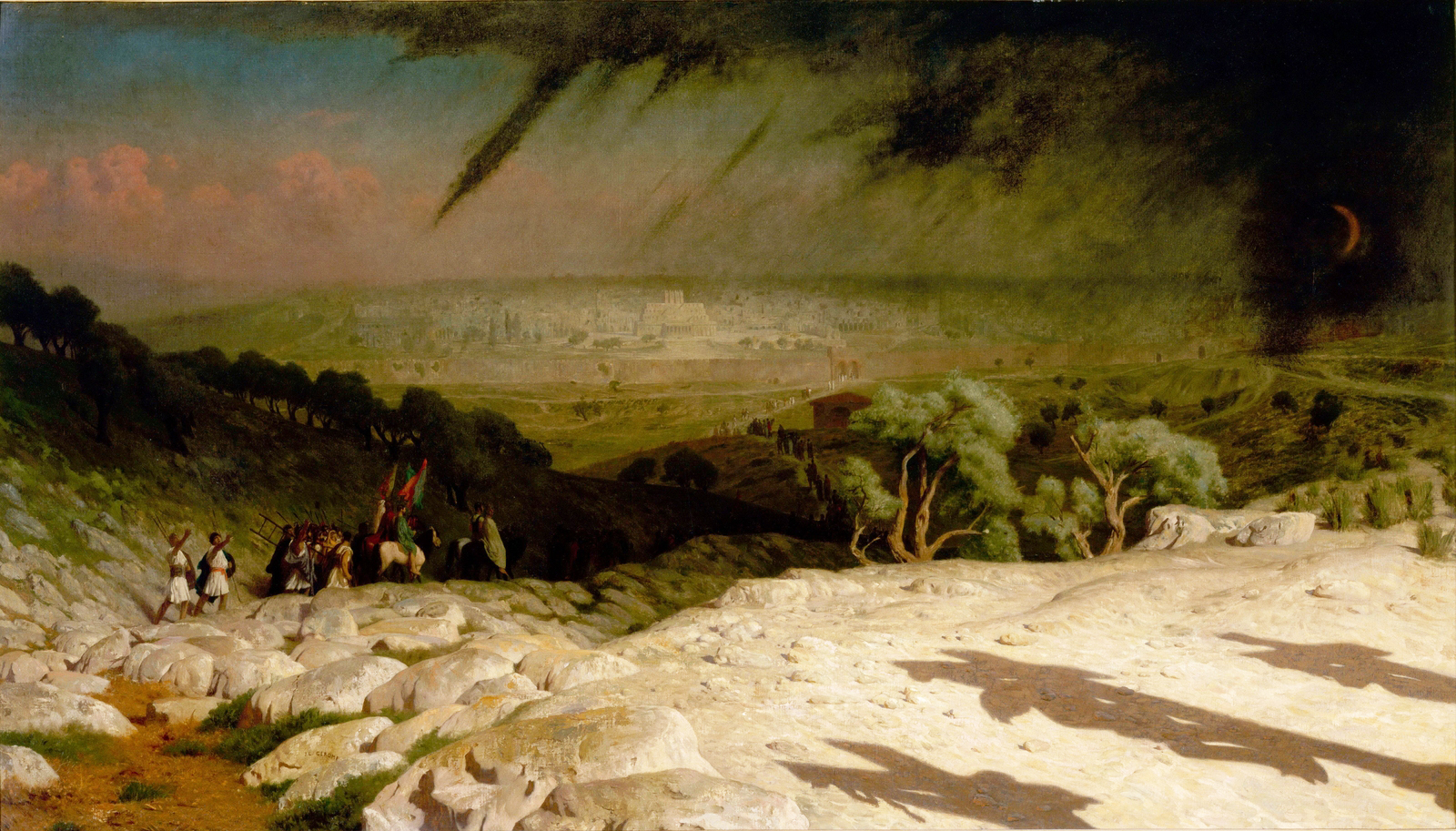 «Consummatum est», h/t, 63.5 x 98 cm, Musée d’Orsay, Paris